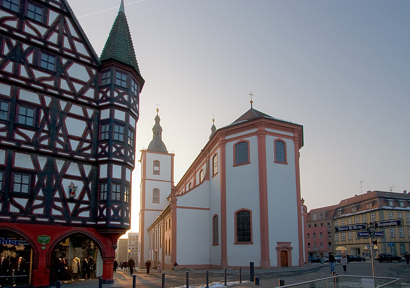 Die Stadtpfarrkirche St. Blasius ist die Mutterpfarrei aller katholischen Pfarreien der Stadt Fulda sowie das letzte bedeutende Gebäude, welches im Zeitalter des Barocks errichtet wurde.